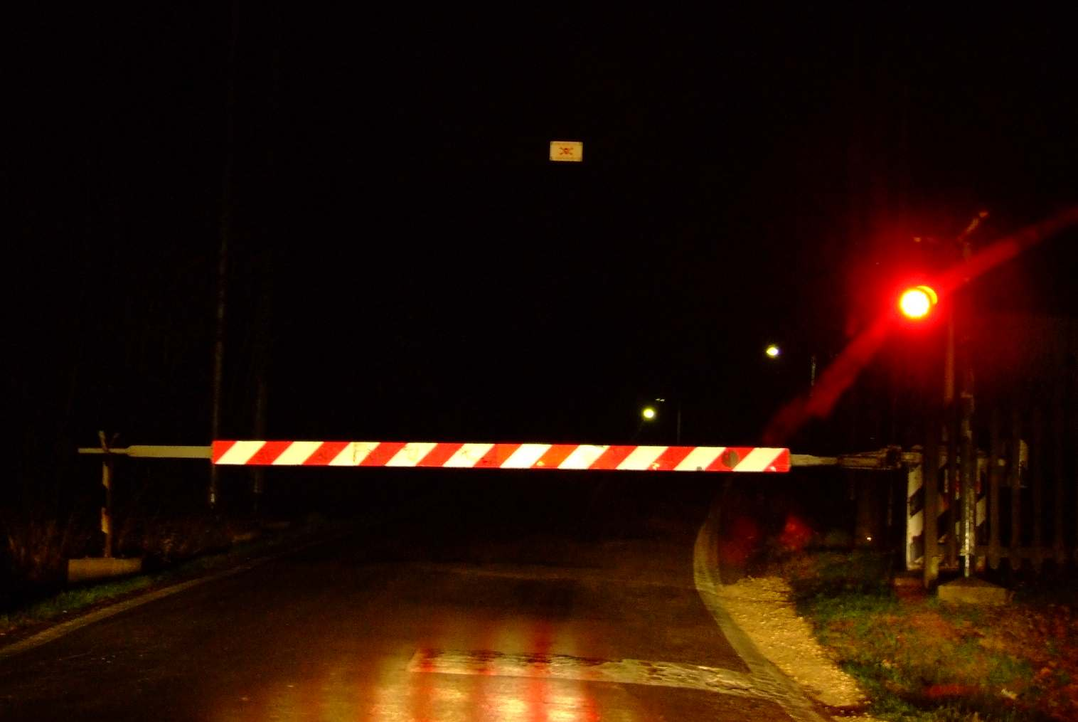 passaggio a livello a Treviso